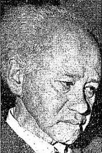 דיוקנו של ד"ר אהרן ברמן, מנהל תיכון חדש בתל אביב